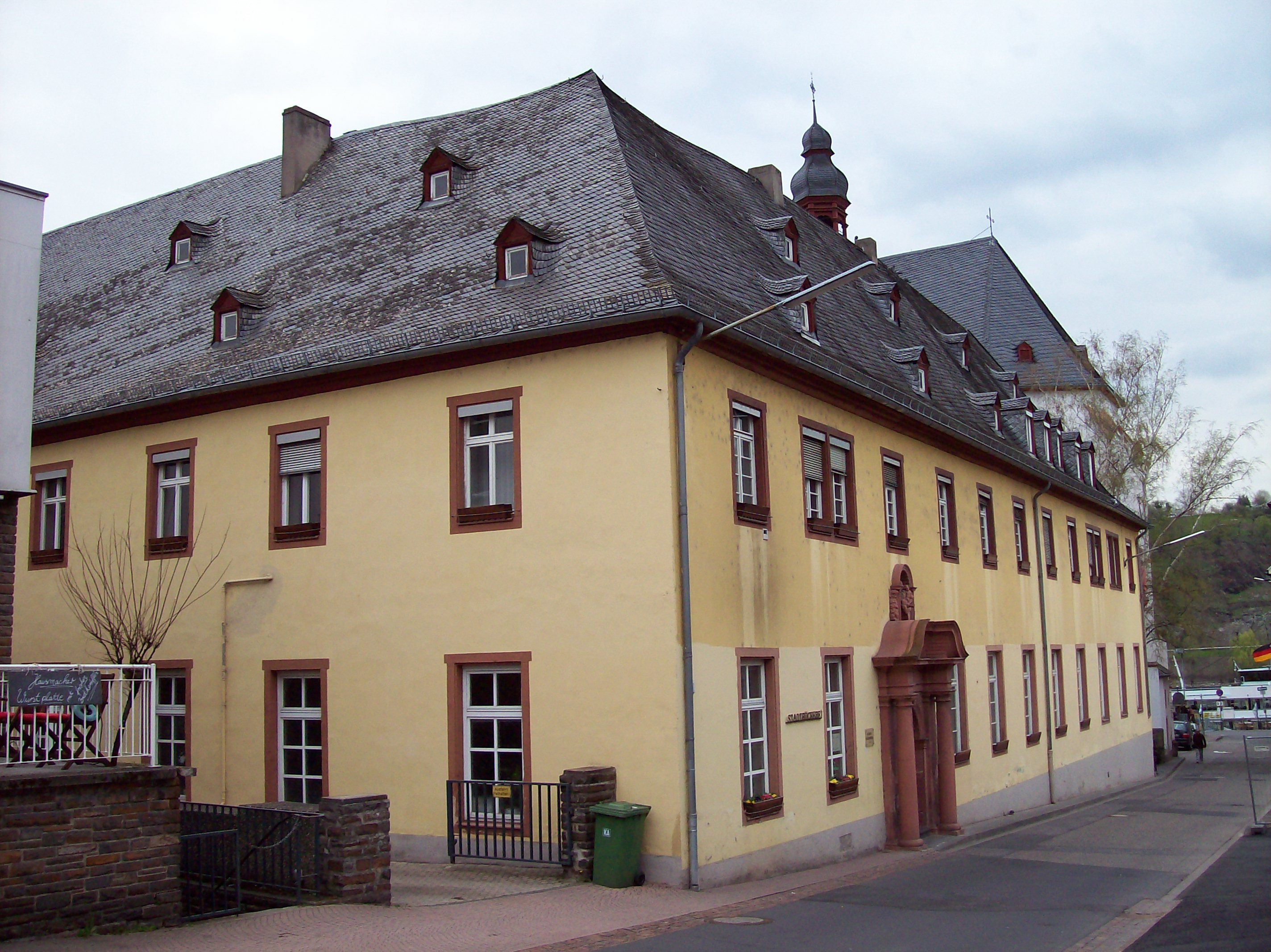 Ehemaliges Karmeliterkloster und heutige Stadtverwaltung von Boppard.